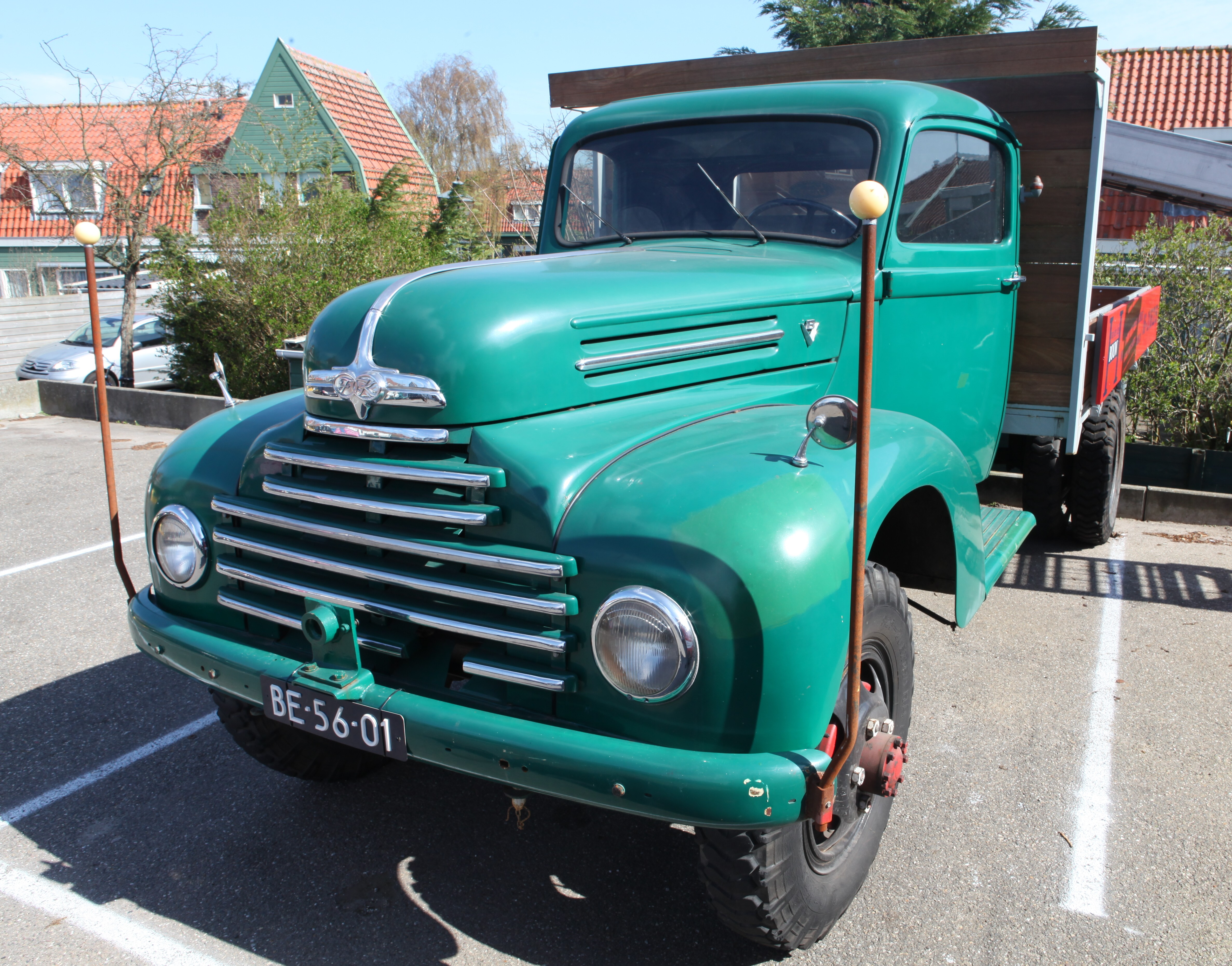 Ford FK